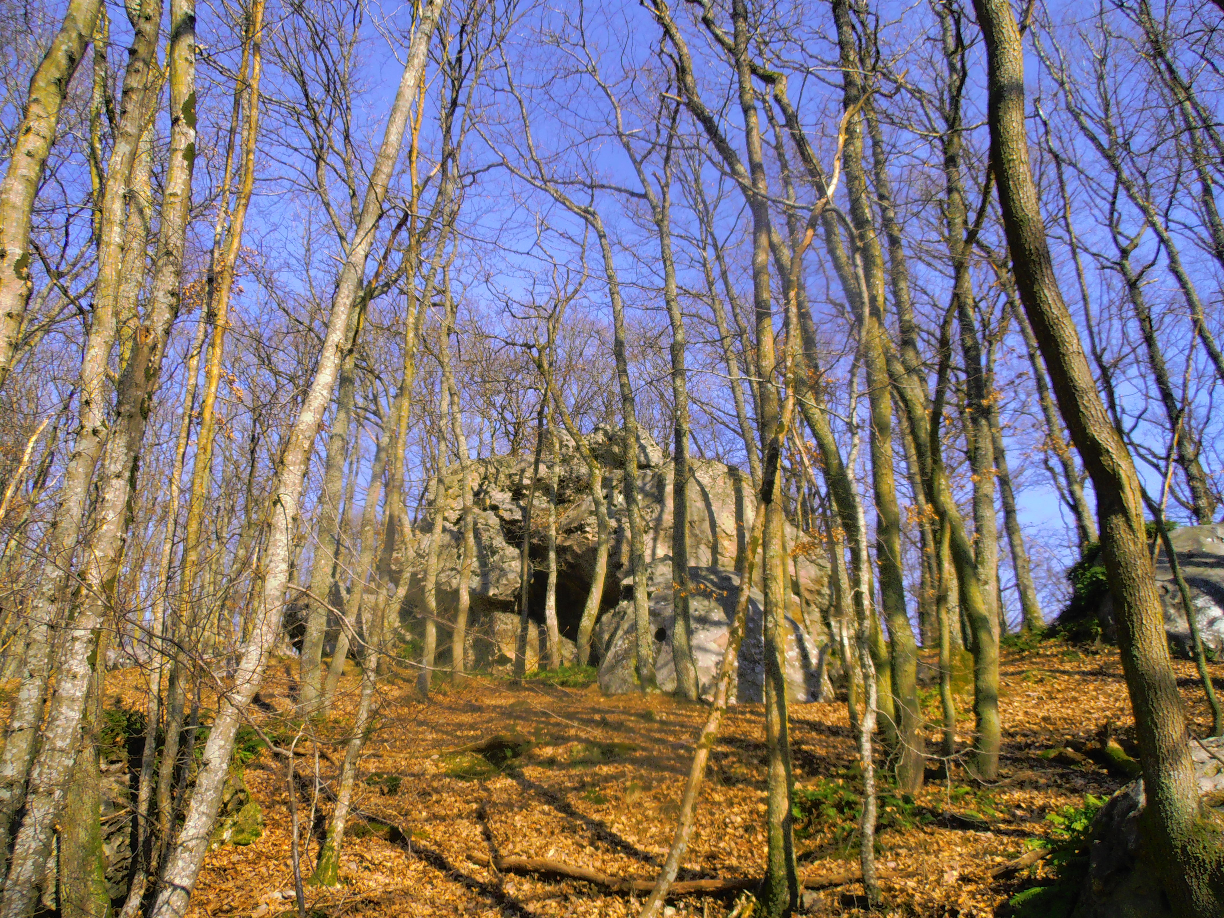 Roche en grès dites de Cromlech de l'aurignacien au Val Dampierre à Saint-Julien-du-Saul